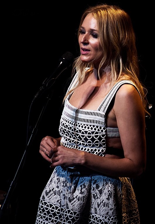 Jewel in 2016.